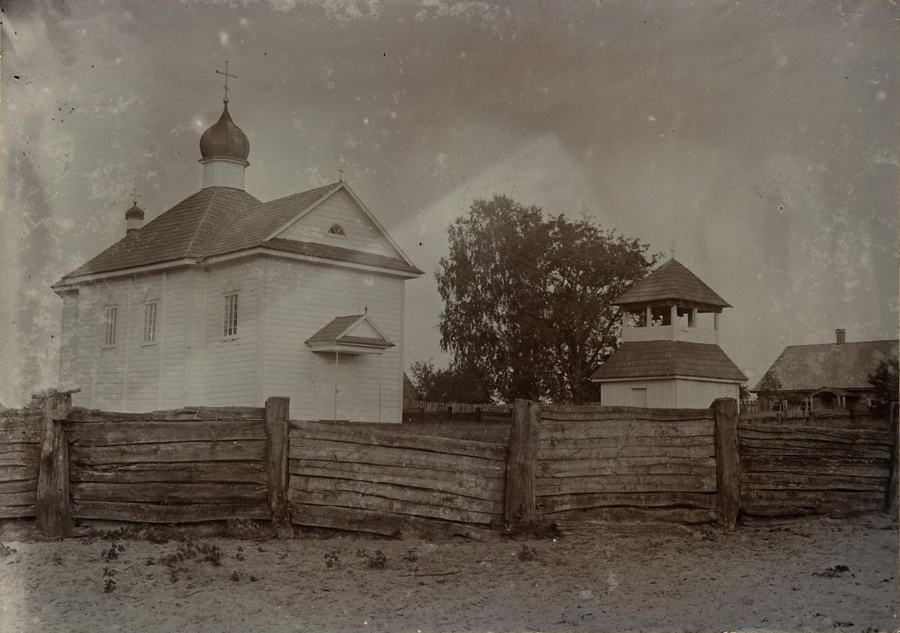 Беларуская (тарашкевіца): Вуйвічы (Vujvičy). Ільлінская царква